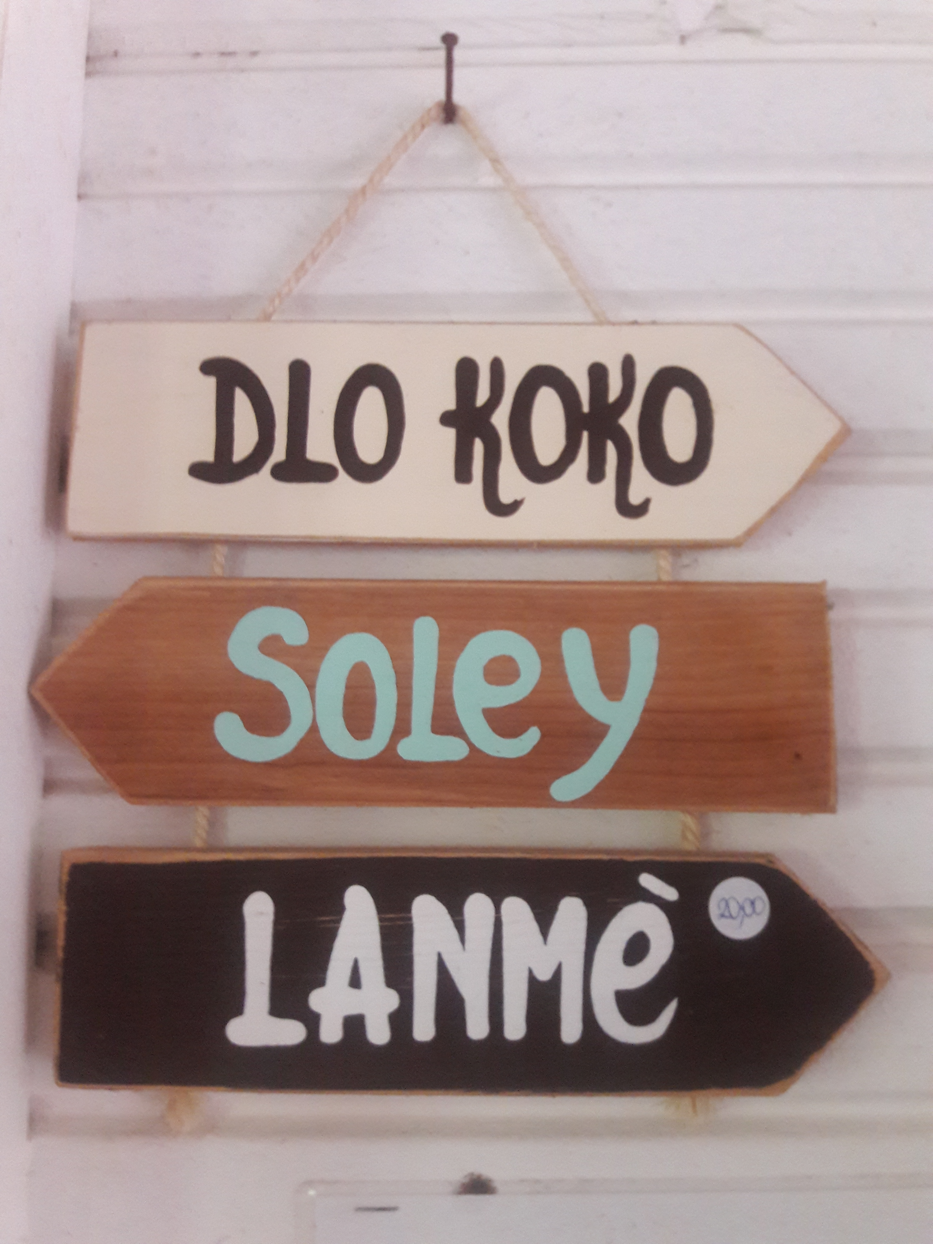 Panneaux en bois avec trois inscriptions en créole martiniquais (en vente dans une boutique de Martinique) : Dlo Koko : "de l'eau de coco" = jus de coco Soley = soleil Lanmè = la mer